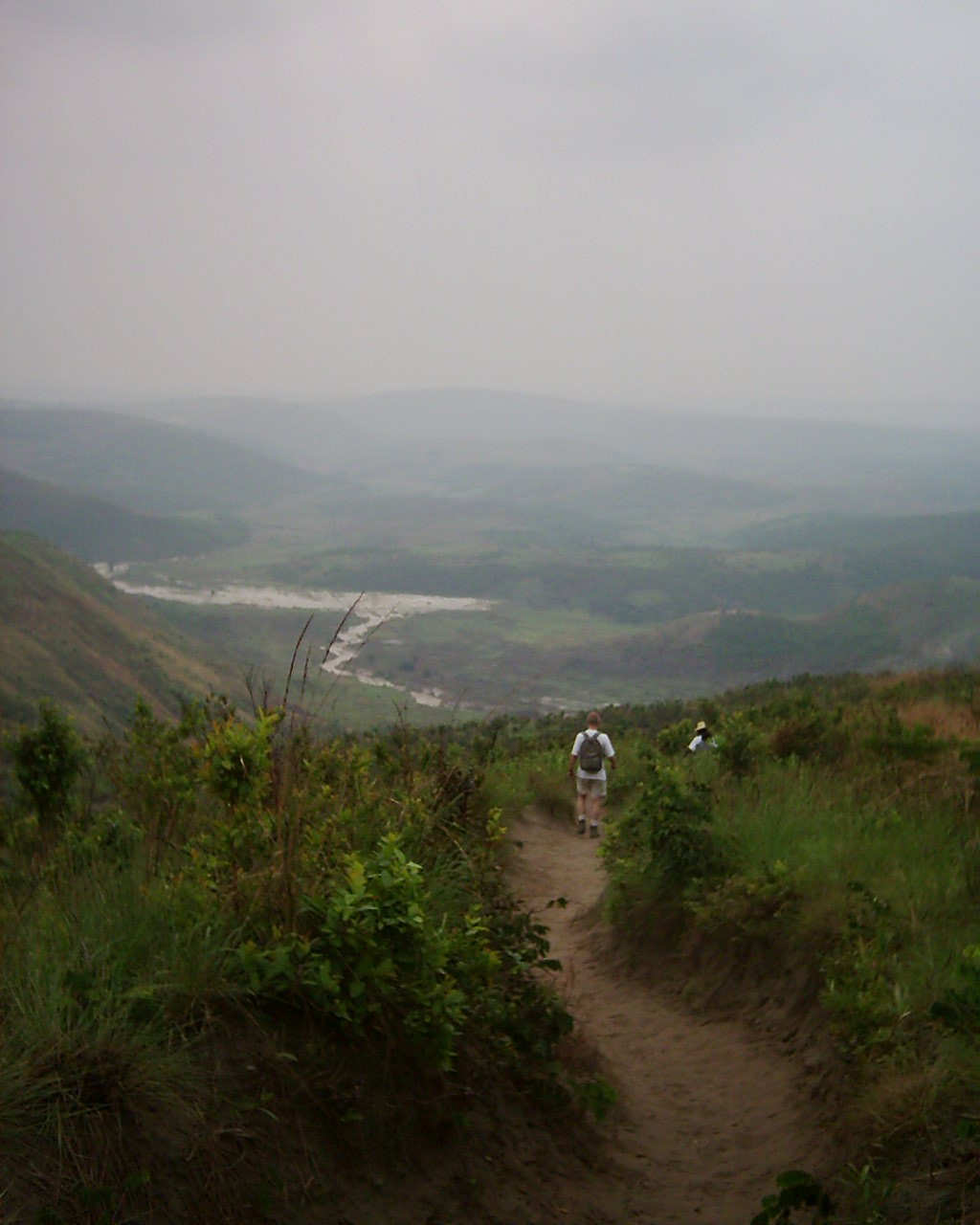 Mont Mangengenge, Kinshasa, RDC, summer 2003 Personal picture, I set it in public domain.